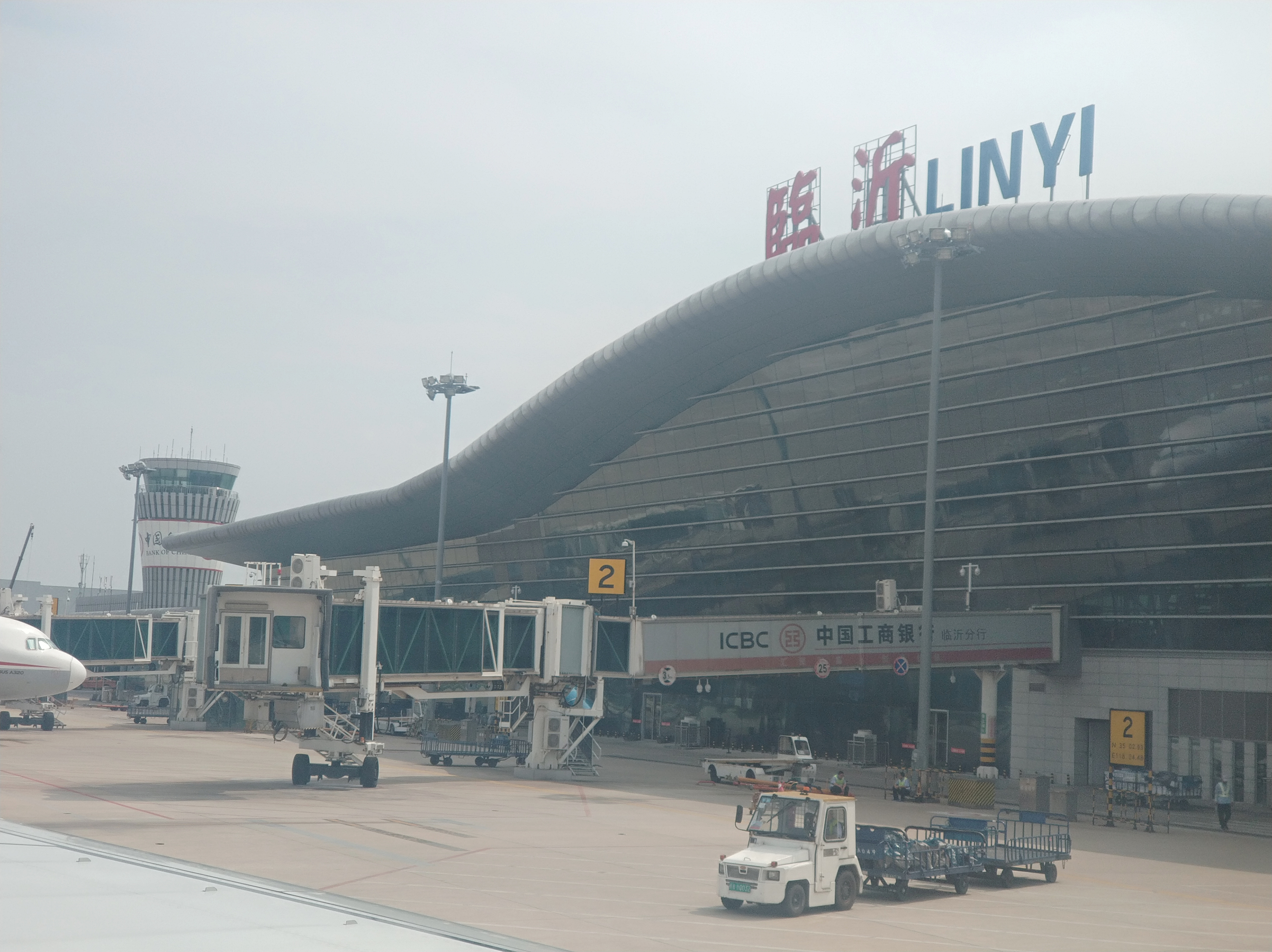 中文（中国大陆）: 临沂沐埠岭国际机场